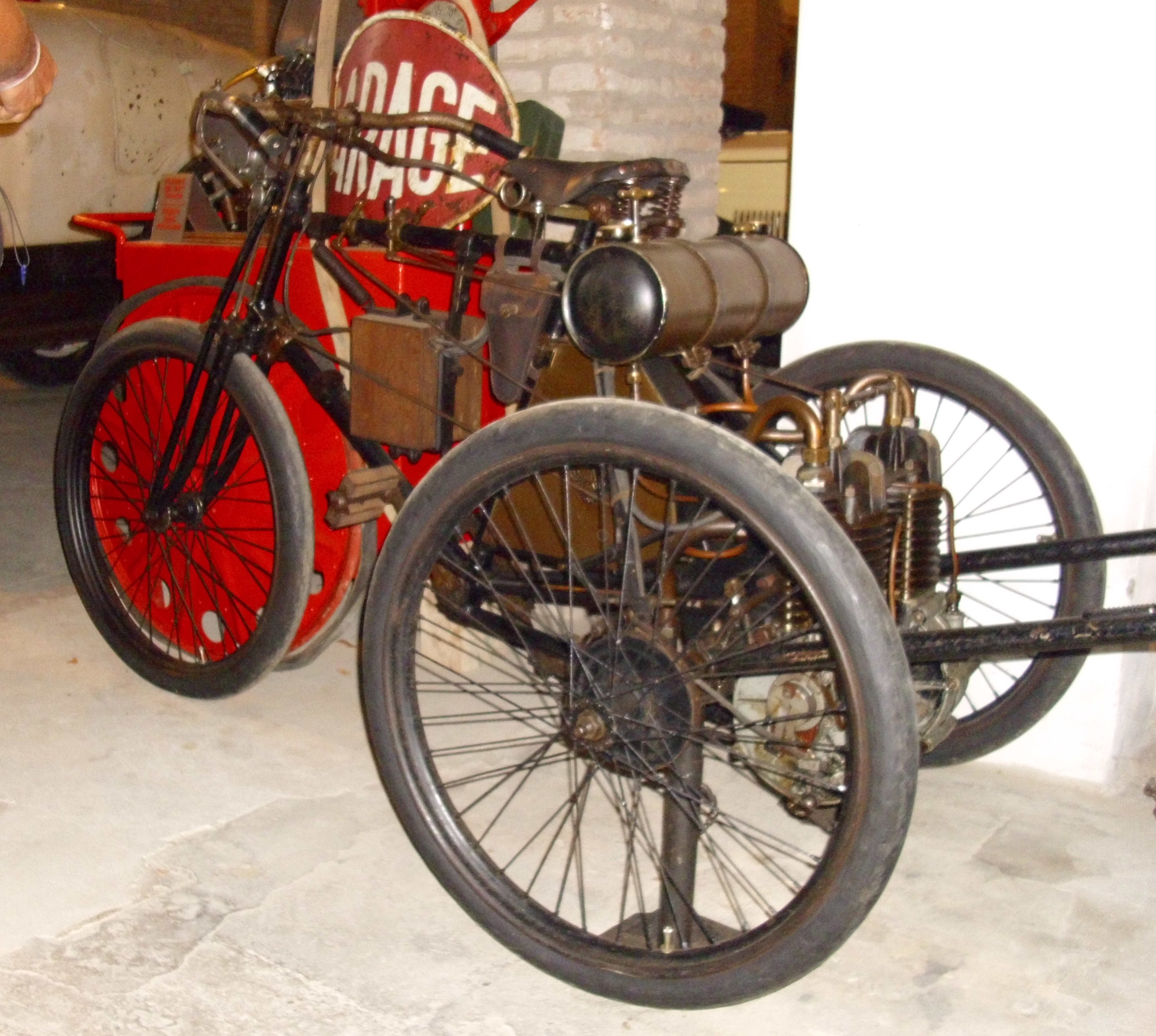 Prinetti & Stucchi Dreirad 1899